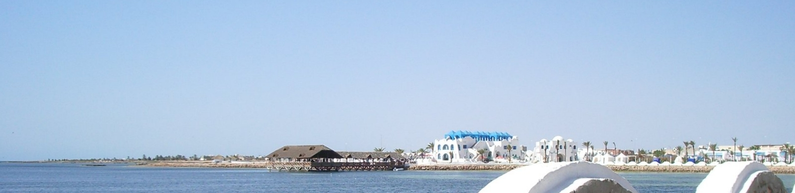 Ajim (Djerba)